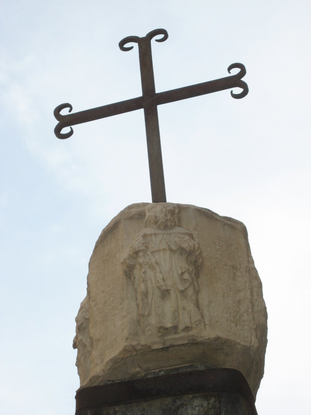 Reproducció d'una creu situada al Pont dels Escalls en record de la Signatura dels Pariatges, document de 1278 i 1288 de reconciliació i arbitratge entre el bisbe d'Urgell i el comte de Foix. El document va donar origen a la institució del coprincipat i és considerat com el principal document històric d'Andorra